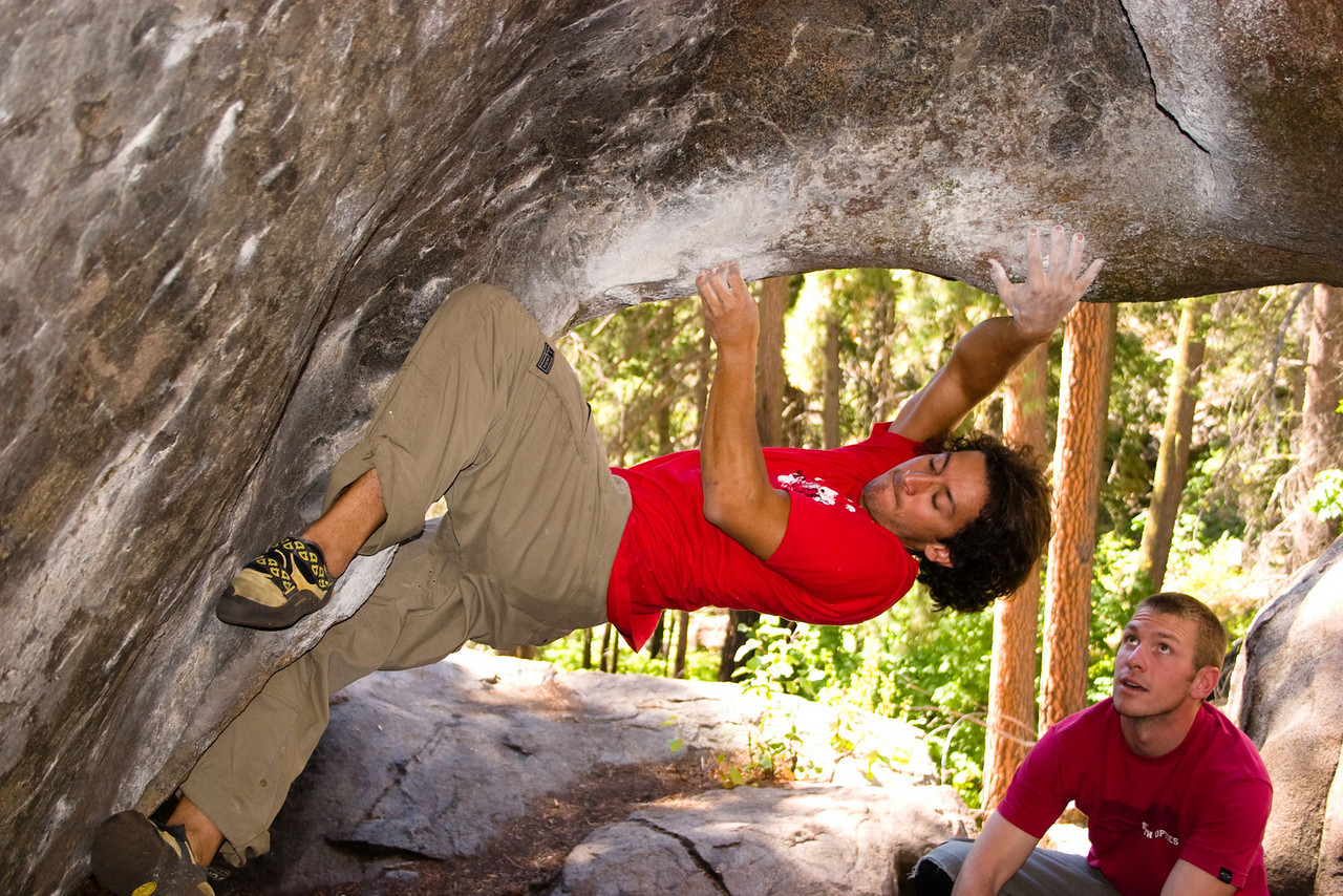 Strength